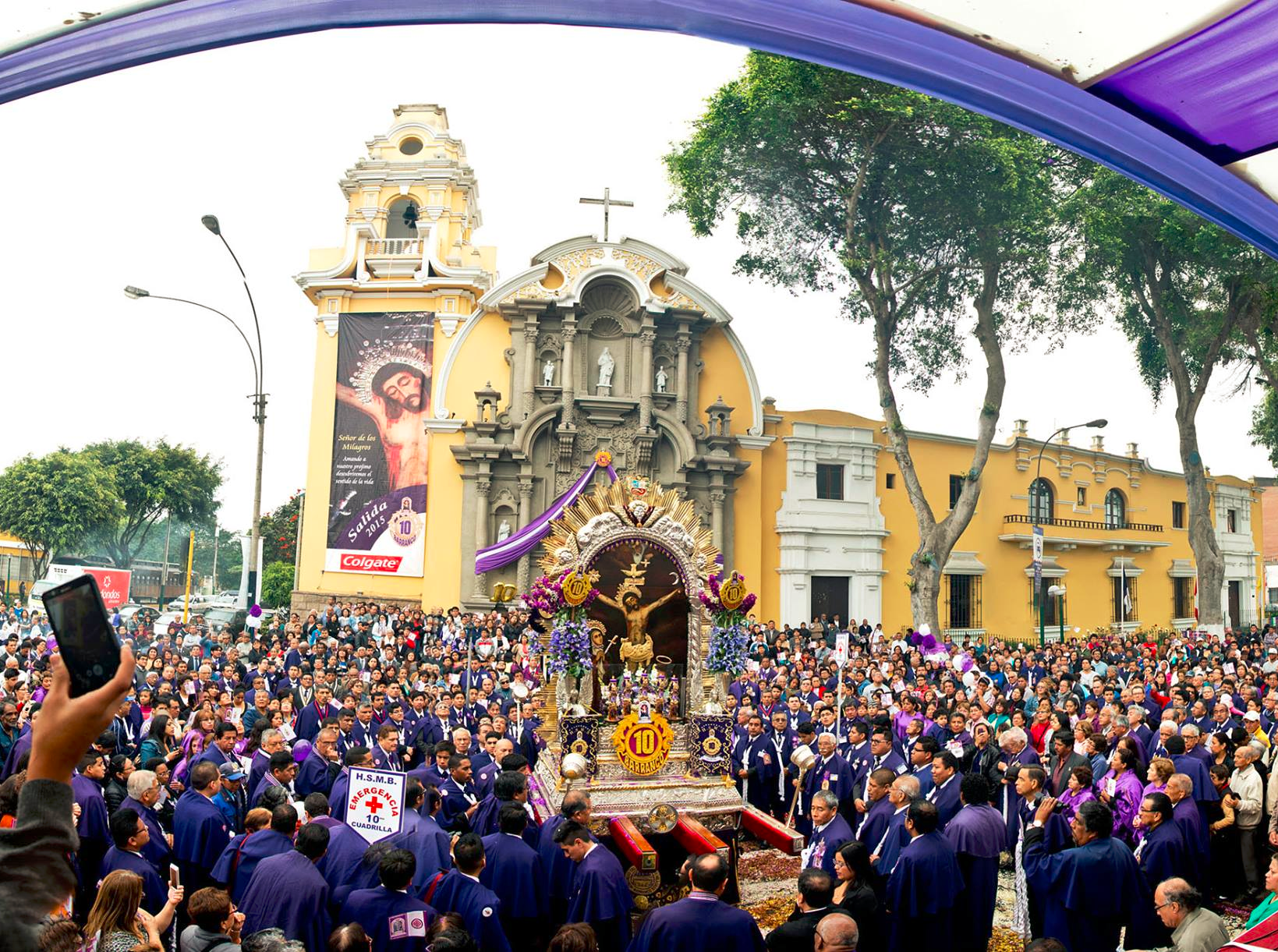 Es una de las festividades más importantes del distrito de Barranco